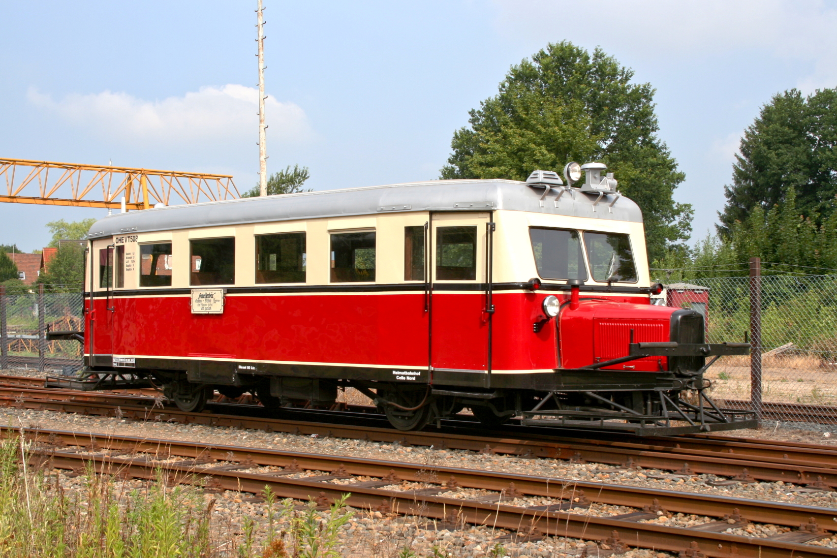 Leichttriebwagen Typ Wismar VT 508 der Osthannoversche Eisenbahnen (OHE) in Soltau am 24. Juli 2006.